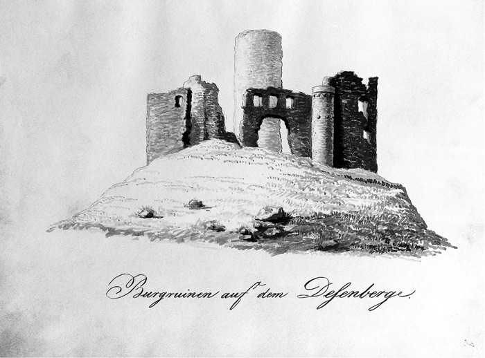 Desenberg, Warburg, Ansicht von Osten; Federzeichnung „Burgruinen auf dem Desenberge“ von F. J. Brandt aus dem 2. Viertel des 19. Jahrhunderts.